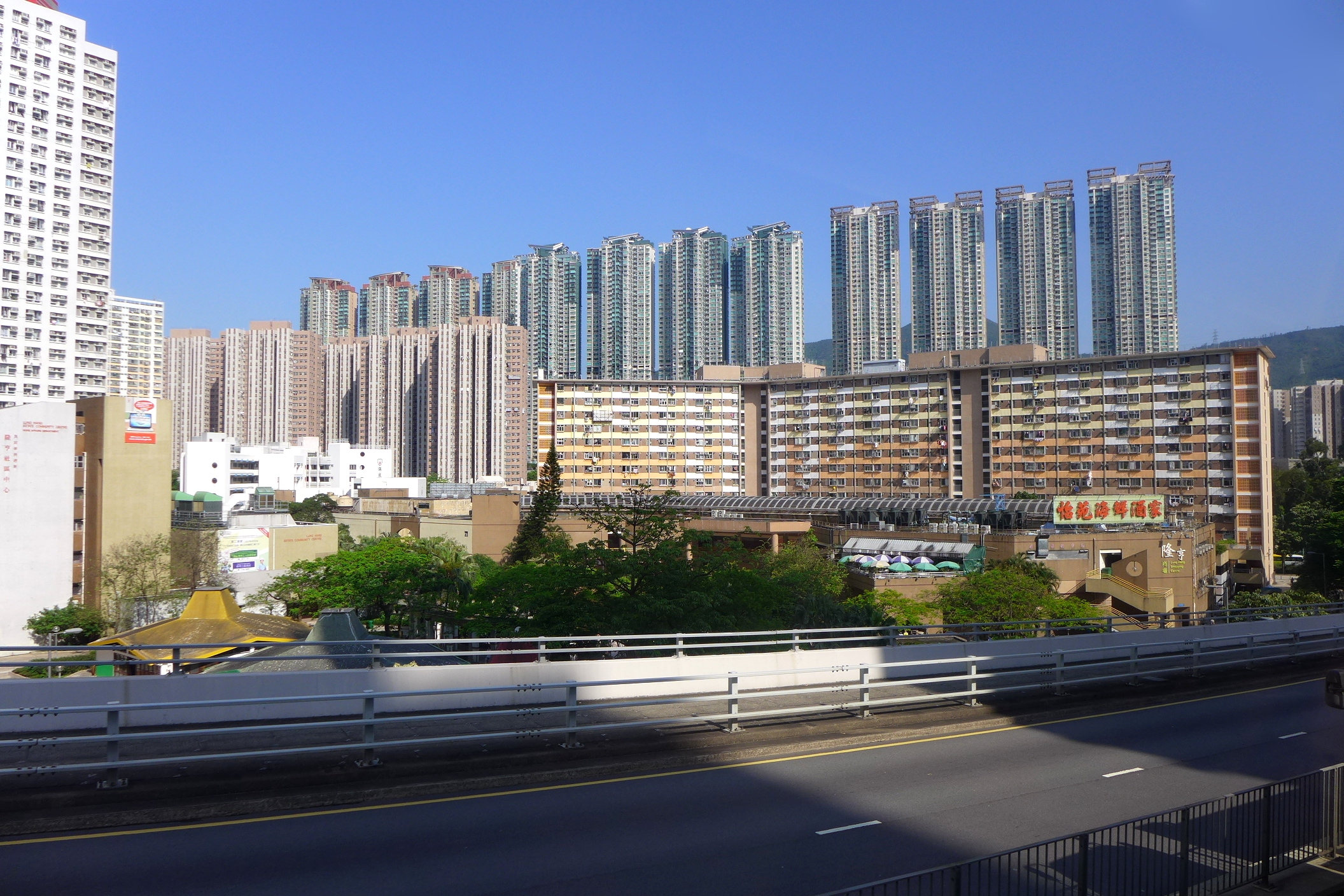 Lung Hang Estate